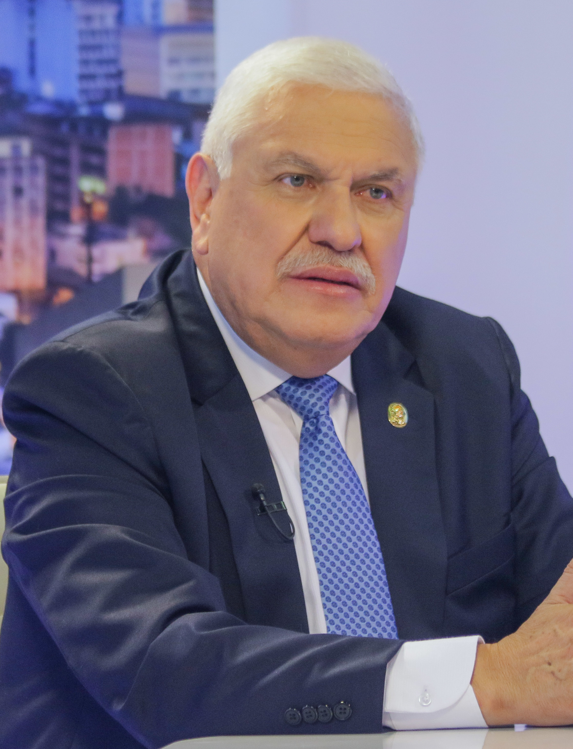 Quito 7 Feb (ANDES).- Entrevista en el programa Frente a los Medios al alcalde de la ciudad de Cuenca, Marcelo Cabrera. Fotografías: Carlos Rodríguez/Andes. FRENTE A LOS MEDIOS / MARCELO CABRERA Quito 7 Feb (ANDES).- Entrevista en el programa Frente a los Medios al alcalde de la ciudad de Cuenca, Marcelo Cabrera. Fotografías: Carlos Rodríguez/Andes.